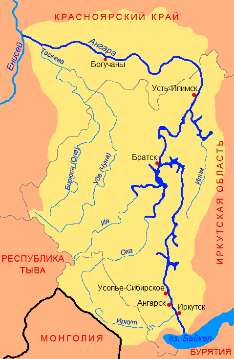 Схема бассейна реки Ангара